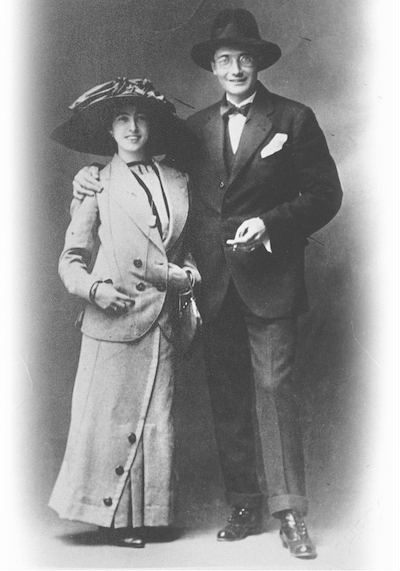 Voda de Virxinia e Castelao